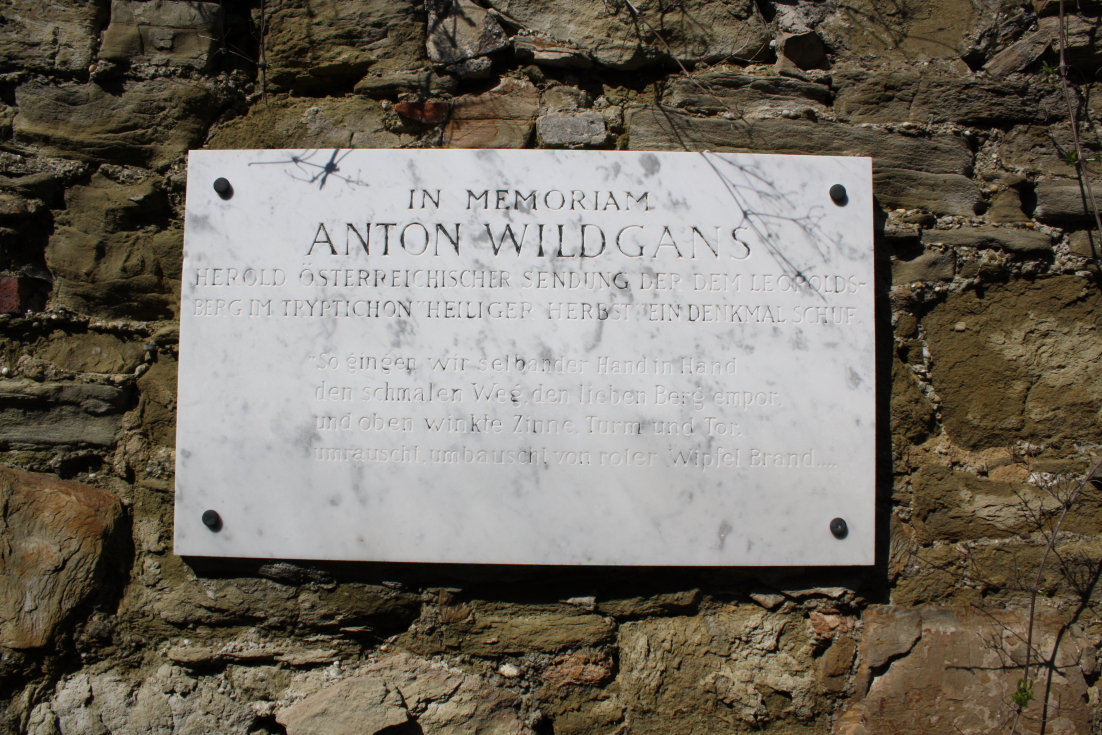 Gedenktafel Anton Wildgans (1881-1932) am Leopoldsberg im 19. Wiener Gemeindebezirk Döbling.